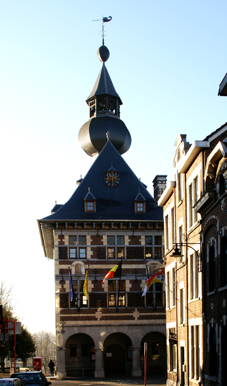 Hôtel de Ville de Visé - Casa de la Vila